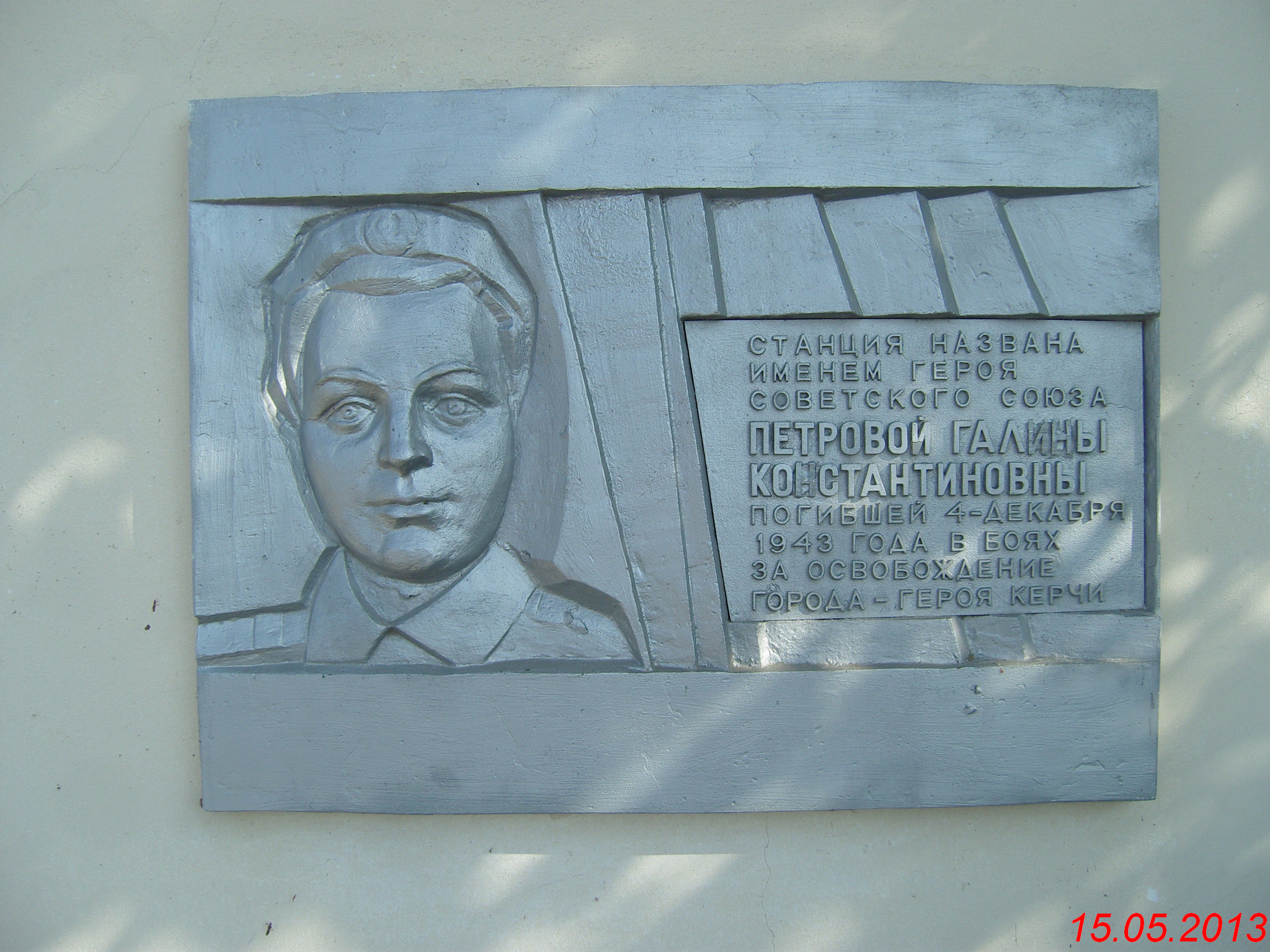 Залізнична станція Петрове